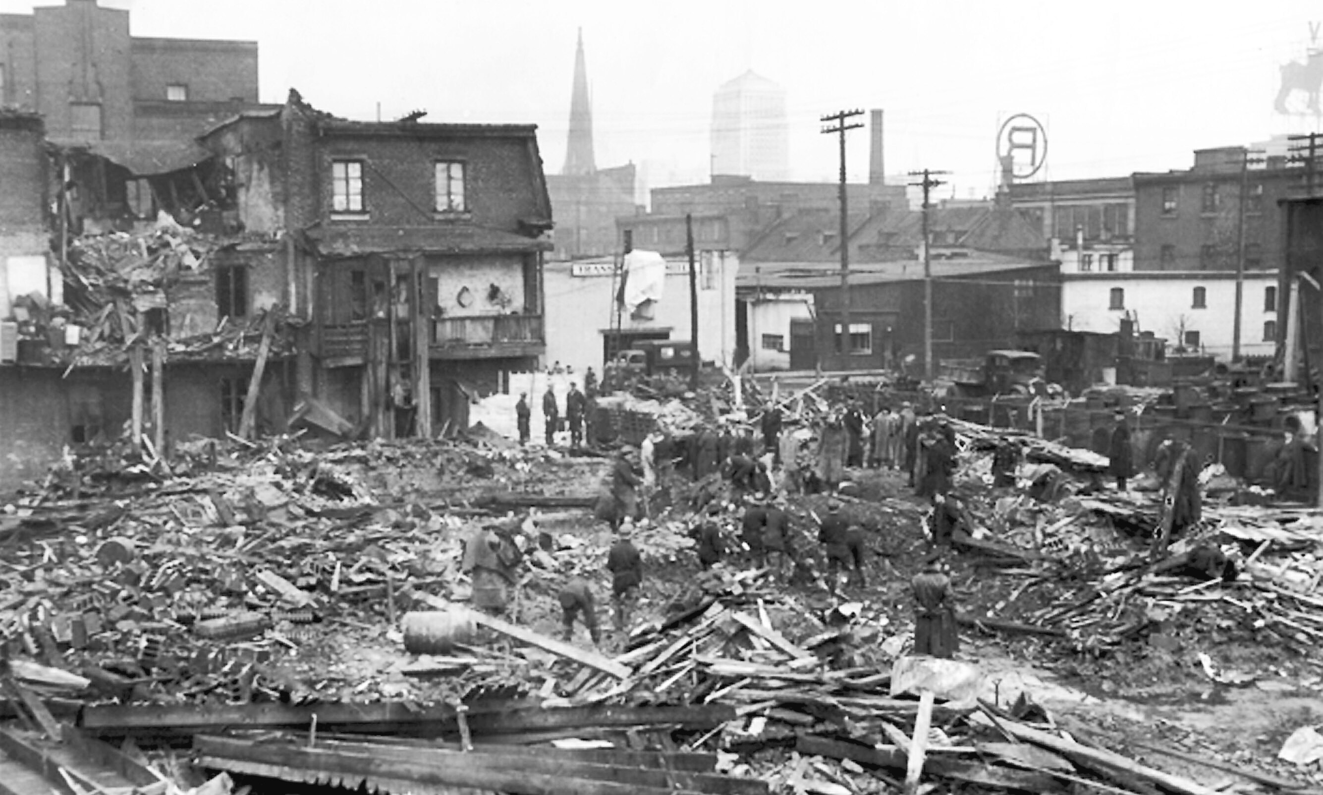 189, rue Peel, Montréal, 1944-04-25 « La photo est prise par le journaliste Roger Champoux quelques heures après le drame. Ce 25 avril 1944, à 10 h 26 le matin, le bombardier B-24 Liberator Consolidated s’est écrasé dans le quartier de Griffintown. Les cinq membres d’équipage ont péri. Quatorze logis ouvriers au coin sud-ouest des rues Shannon et Ottawa ont volé en éclat. Les réservoirs d’hydrocarbures de l’appareil ont explosé, créant une onde de choc digne d’un tremblement de terre et un incendie considérable. Rapidement appelés, les pompiers ont mis des heures à maîtriser le brasier. »